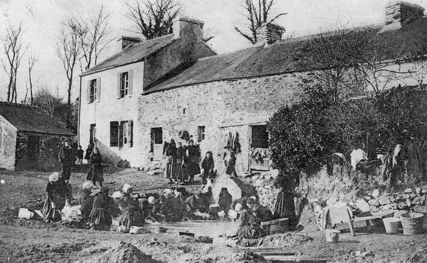 Kerhon : un lavoir vers 1900-1905 (auteur inconnu)